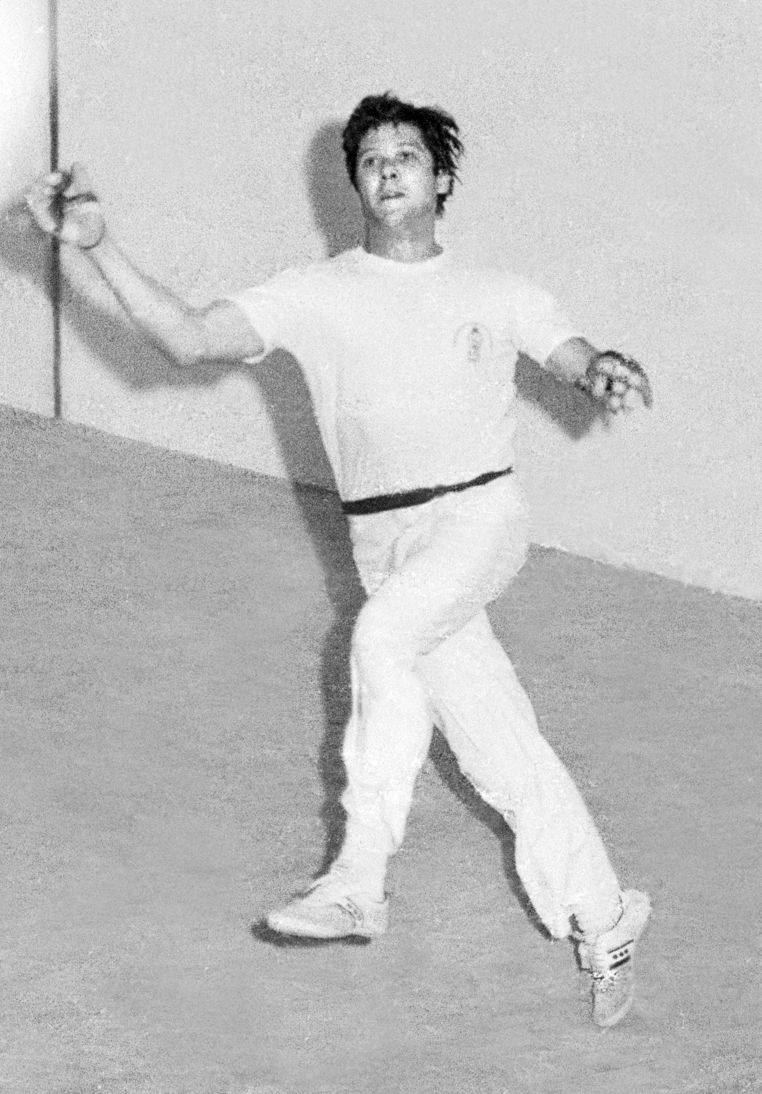 Fotografia d'Ismael Latorre Mendoza amb data 26-06-84. S'hi conserven a l'Arxiu 14 negatius una mica deteriorats de la pilota valenciana amb aquesta data. Francesc Cabanes Pastor, El Genovés, és un dels més grans pilotaris valencians junt a Juliet, Quart, Rovellet i Nel de Murla. Actiu professionalment des de 1972 fins a 1996. Té foto penjada a la Galeria d'Honor del Trinquet de Pelayo (València). Aquesta imatge s'ha publicat a: Revista Fosbury, 2018. Cartell del Trinquet de Pelayo: Trofeu Pilota. Generalitat Valenciana. Escala i Corda. 07-10-2018. Tractament digital: Vicenç Salvador Torres Guerola